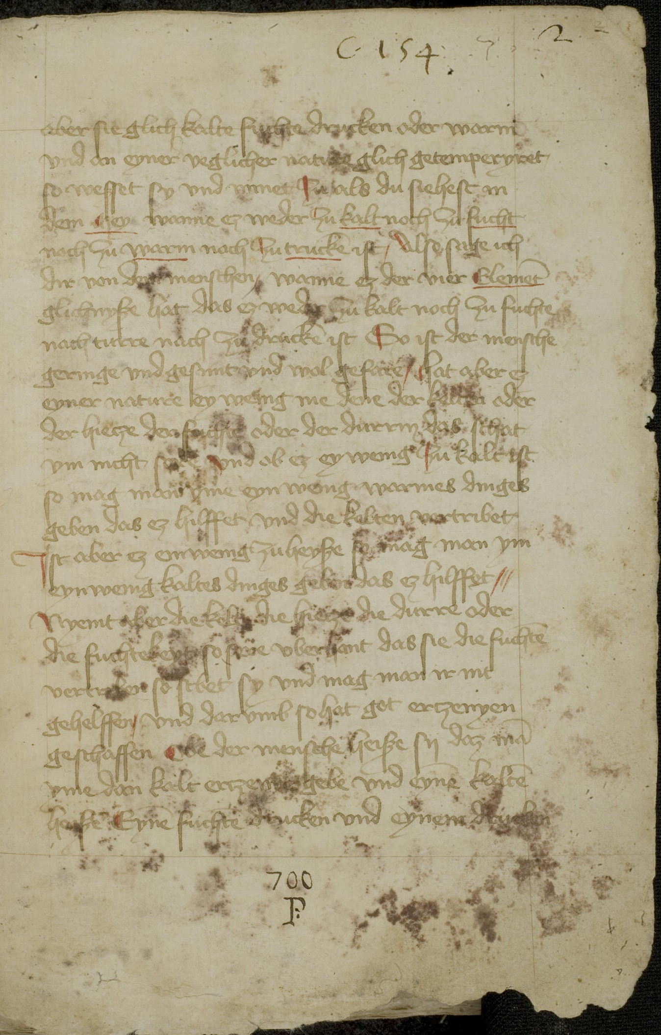 Codex Palatinus germanicus 700, Blatt 2r der Handschrift, "Ortolf von Baierland: 'Arzneibuch'".